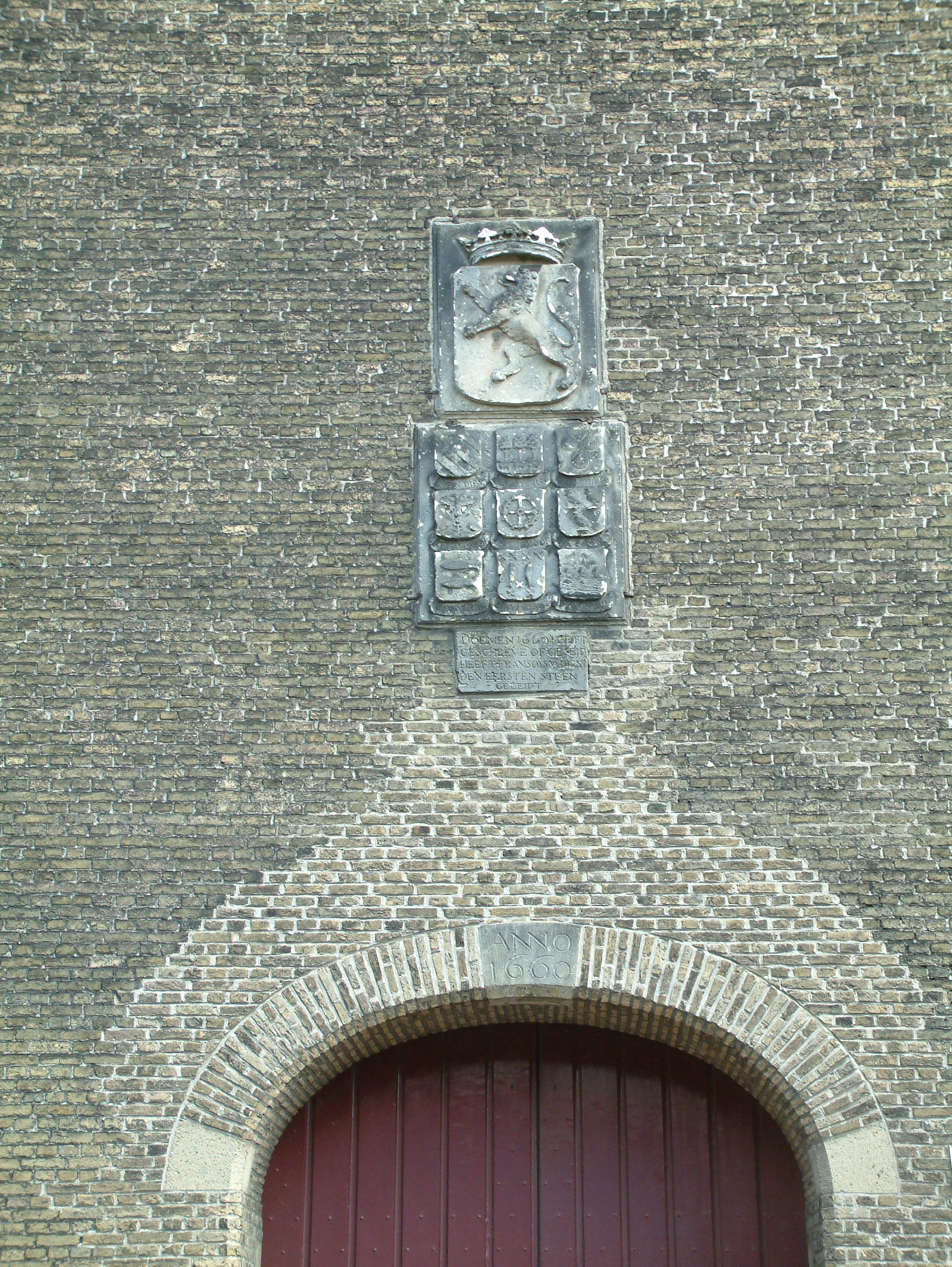 Rotterdam Charlois Oude kerk (3)